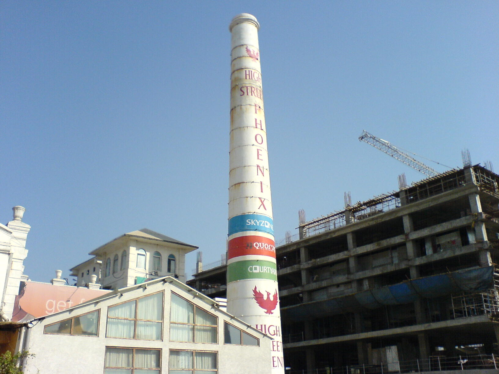 Phoenix mills, Parel, Mumbai